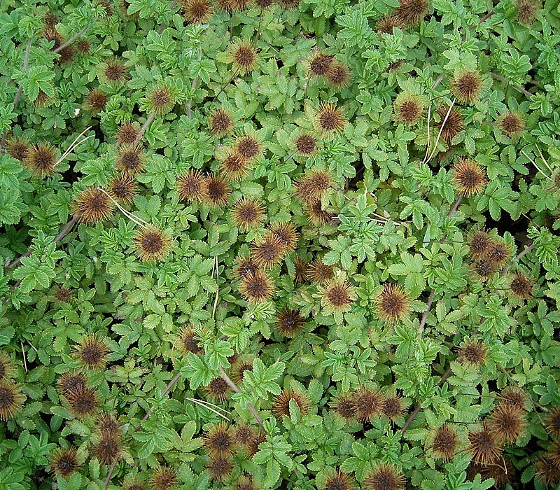 Acaena anserinifoliaAcaena ovalifolia